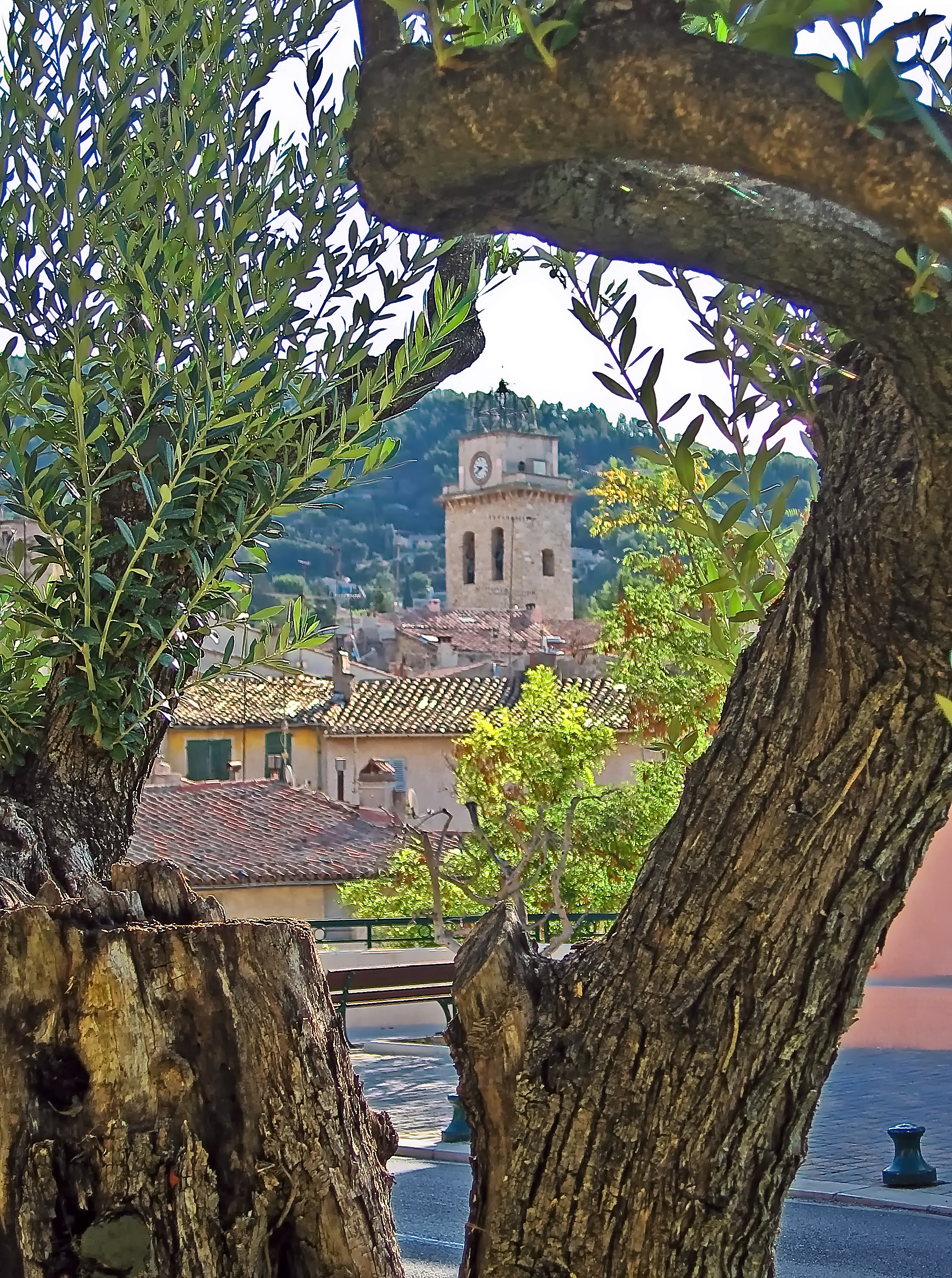 Clocher de Ceyreste